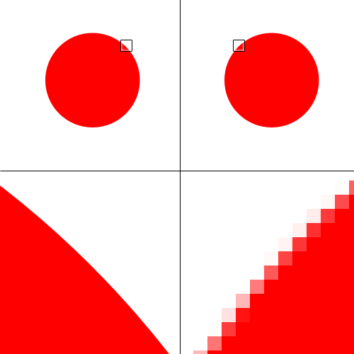 Zelfgemaakte illustratie om het verschil tussen een vector- en rasterafbeelding uit te leggen. Links een vectorafbeelding; vergroting leidt niet tot kwaliteitsverlies. Rechts een rasterafbeelding; vergroting leidt wel tot kwaliteitsverlies.